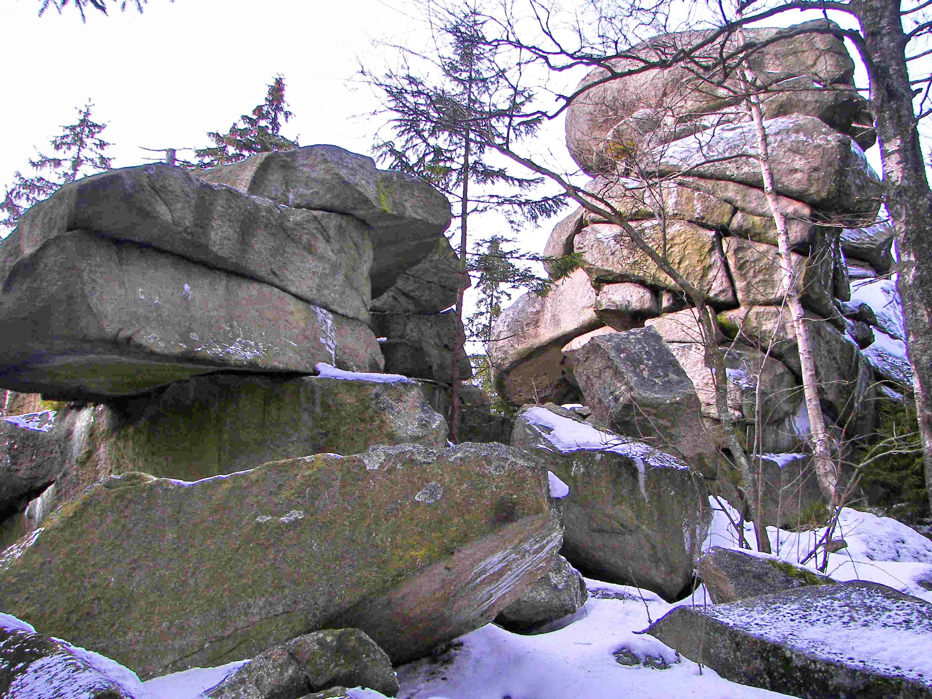 Der Große Haberstein zwischen Luisenburg und Kösseine